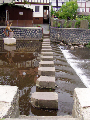 Die Schrittsteine, ein Wahrzeichen der Stadt Lauterbach_(Hessen)